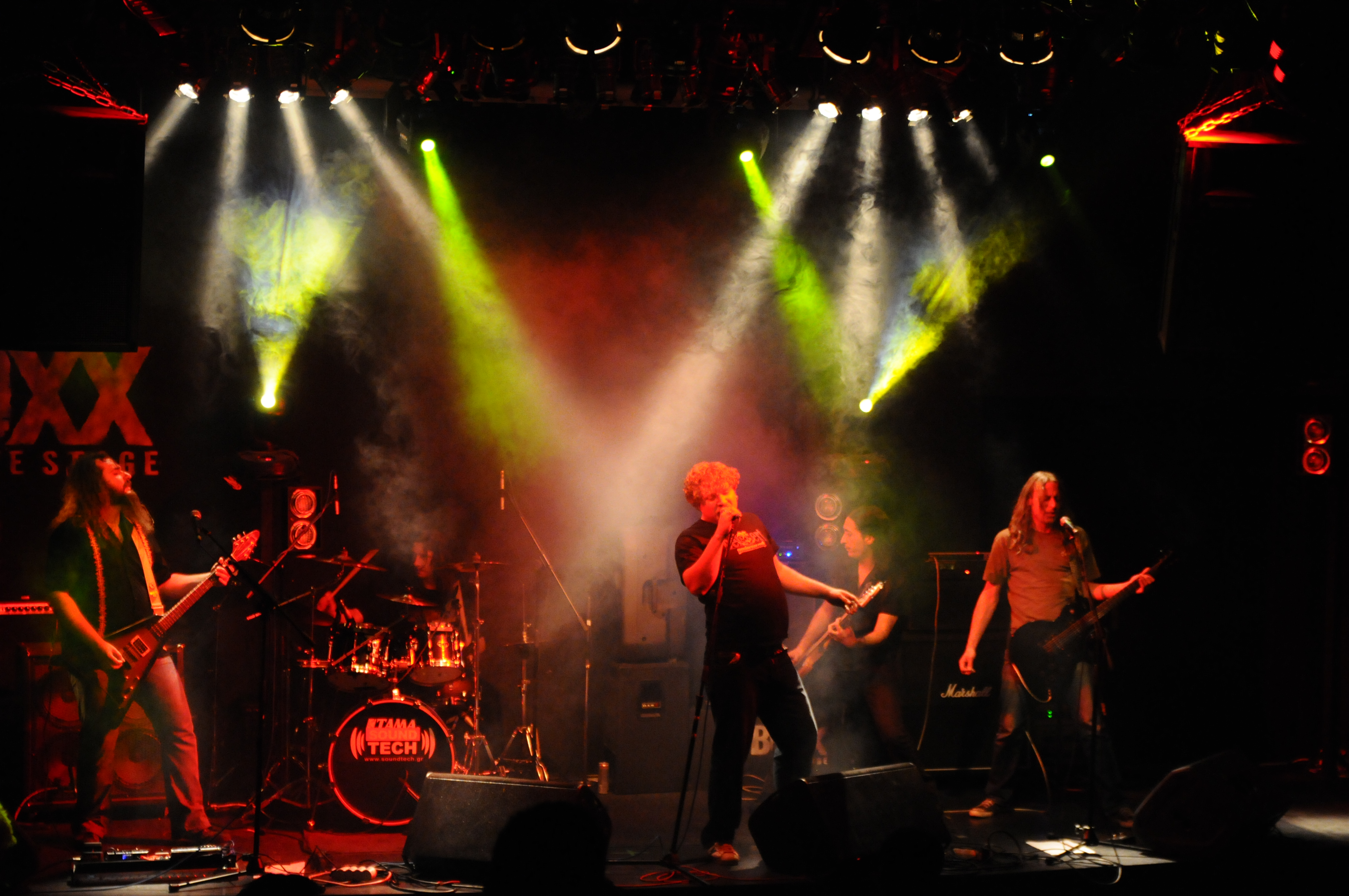 Οι Hattie Green ζωντανά στην σκηνή